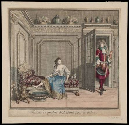 Llit